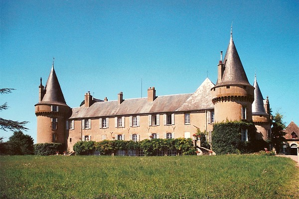 Chateau de Villemolin (Nièvre) (commune : Anthien)